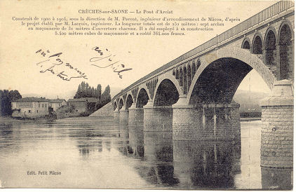 Vue du Pont D'Arciat. Carte postale ancienne tirée de la collection privée de M. Deudon (Lyon), avec son autorisation.